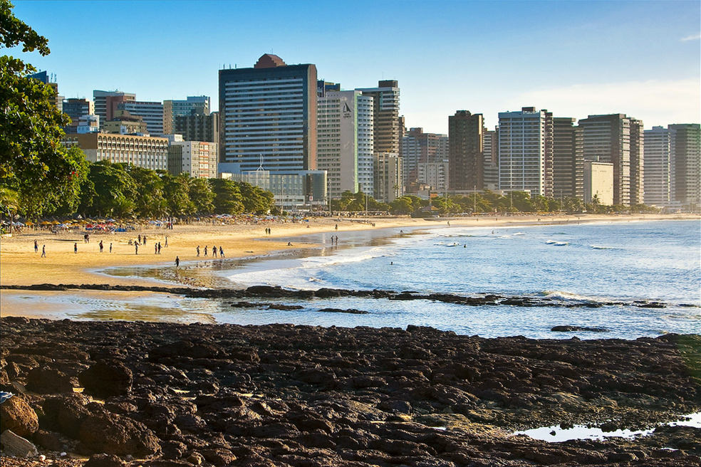 Beira-mar em Fortaleza/Ceará - Brasil.